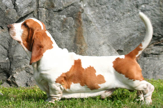 Basset Hound stående i profil